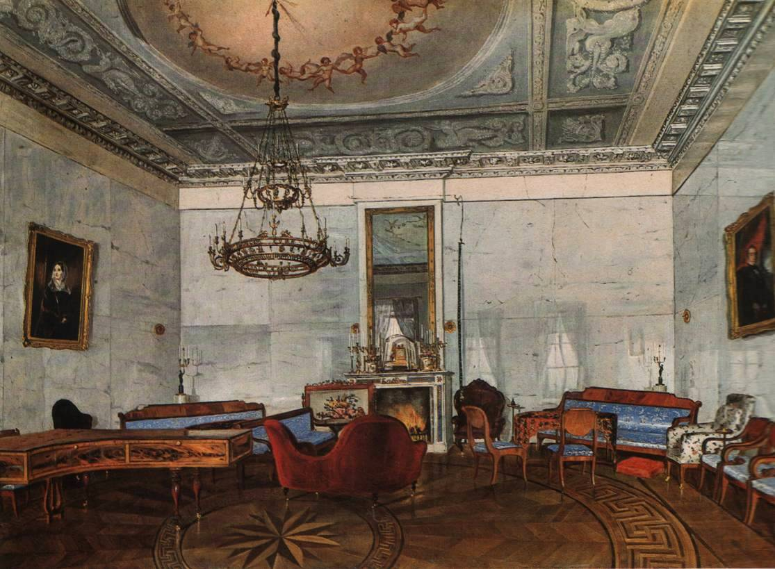 Неизвестный художник середины XIX века Гостиная в доме Александра Николаевича Соймонова 1850—186o-e А.Н. Соймонов (1780—1856) — помещик, отец Сергея Александровича Соболевского, друга А.С. Пушкина. Дом Соймонова находился в Москве на Малой Дмитровке, под номером i8. Богато отделанная и убранная гостиная характерна для того периода в истории бытового интерьера, когда его архитектоника уже несколько нарушается. Расстановка мебели становится асимметричной и часто не подчиняется архитектурным формам помещения. В данном случае диваны „срезают" углы комнаты, образуя с креслами самостоятельную линию мания живописно-композиционный прием, художником — отражение окон на гладкой гостиной.